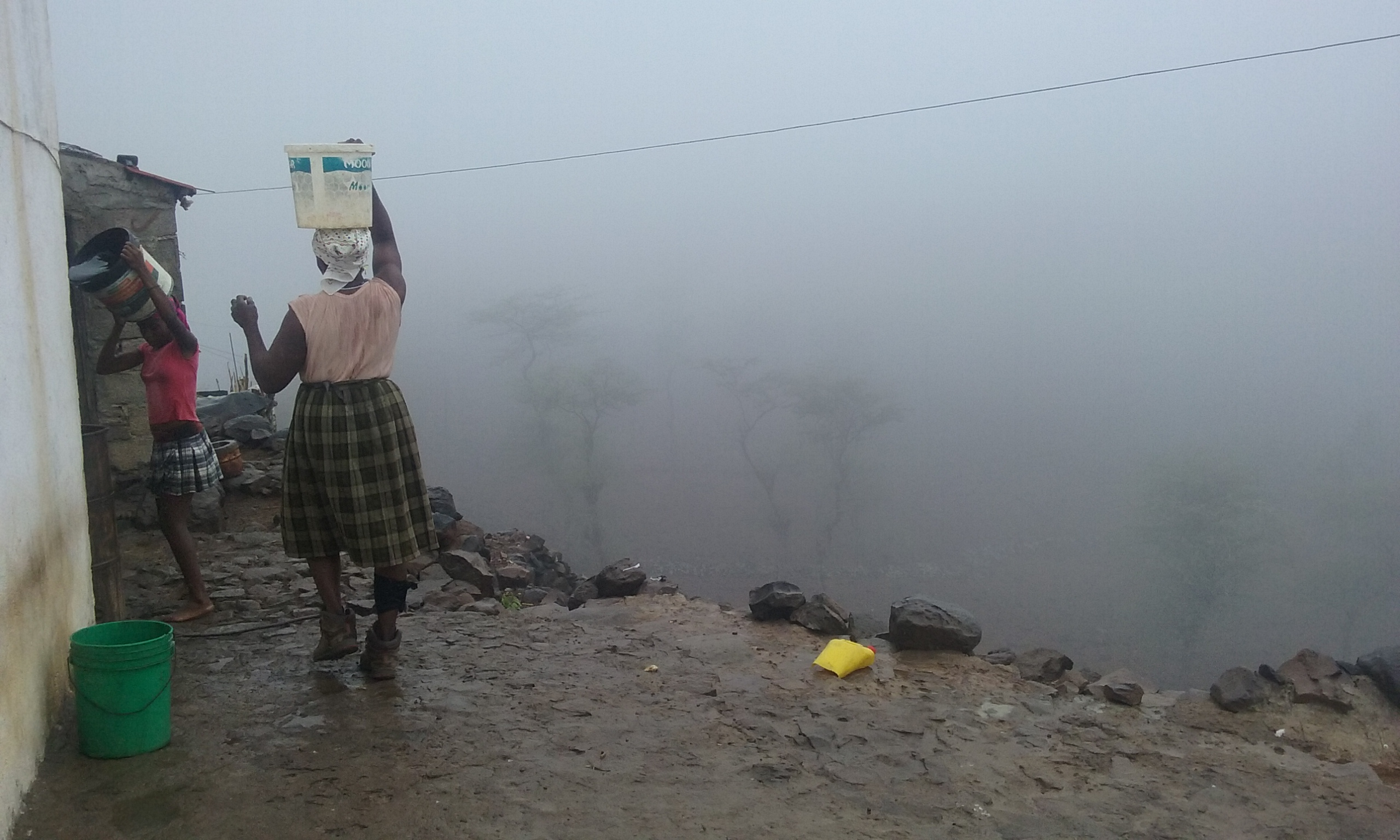 Cette photo représente une femme âgé et une jeûne fille récoltant de l'eau au cap vert This is an image with the theme "Africa on the Move or Transport" from: Cape Verde